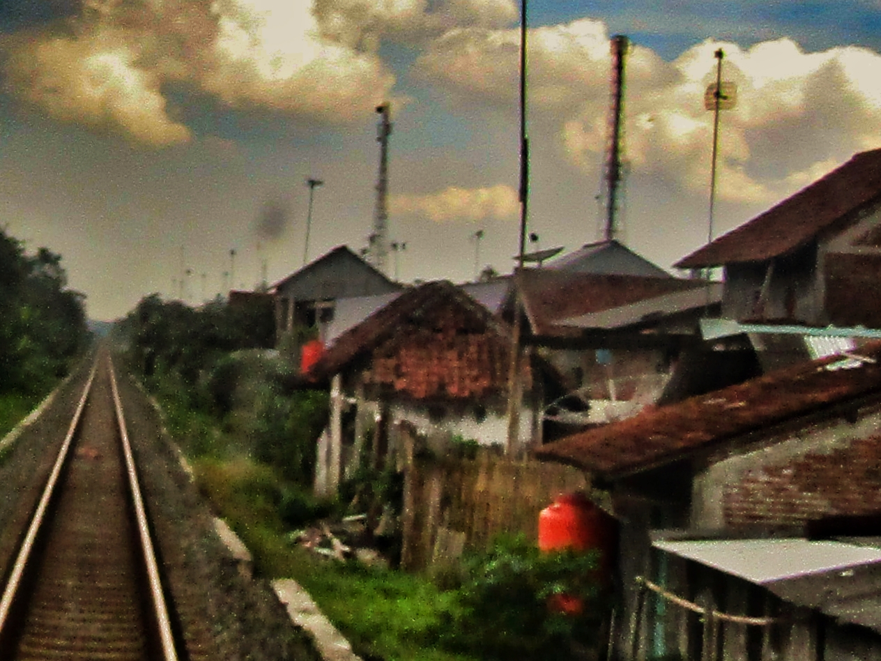 Bangunan utama Halte Sitinggil, 2020